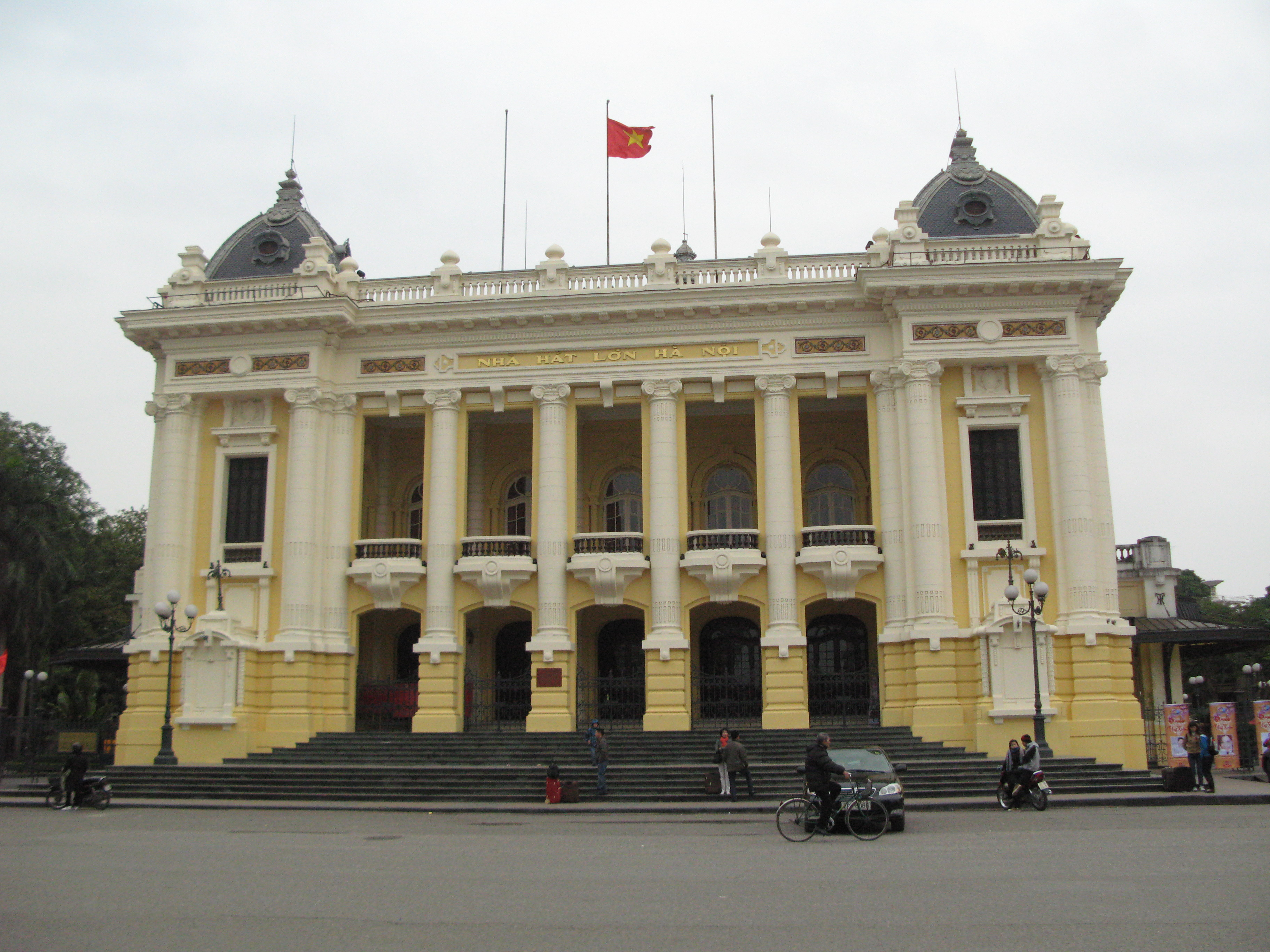 Nhà hát lớn Hà Nội, Việt Nam